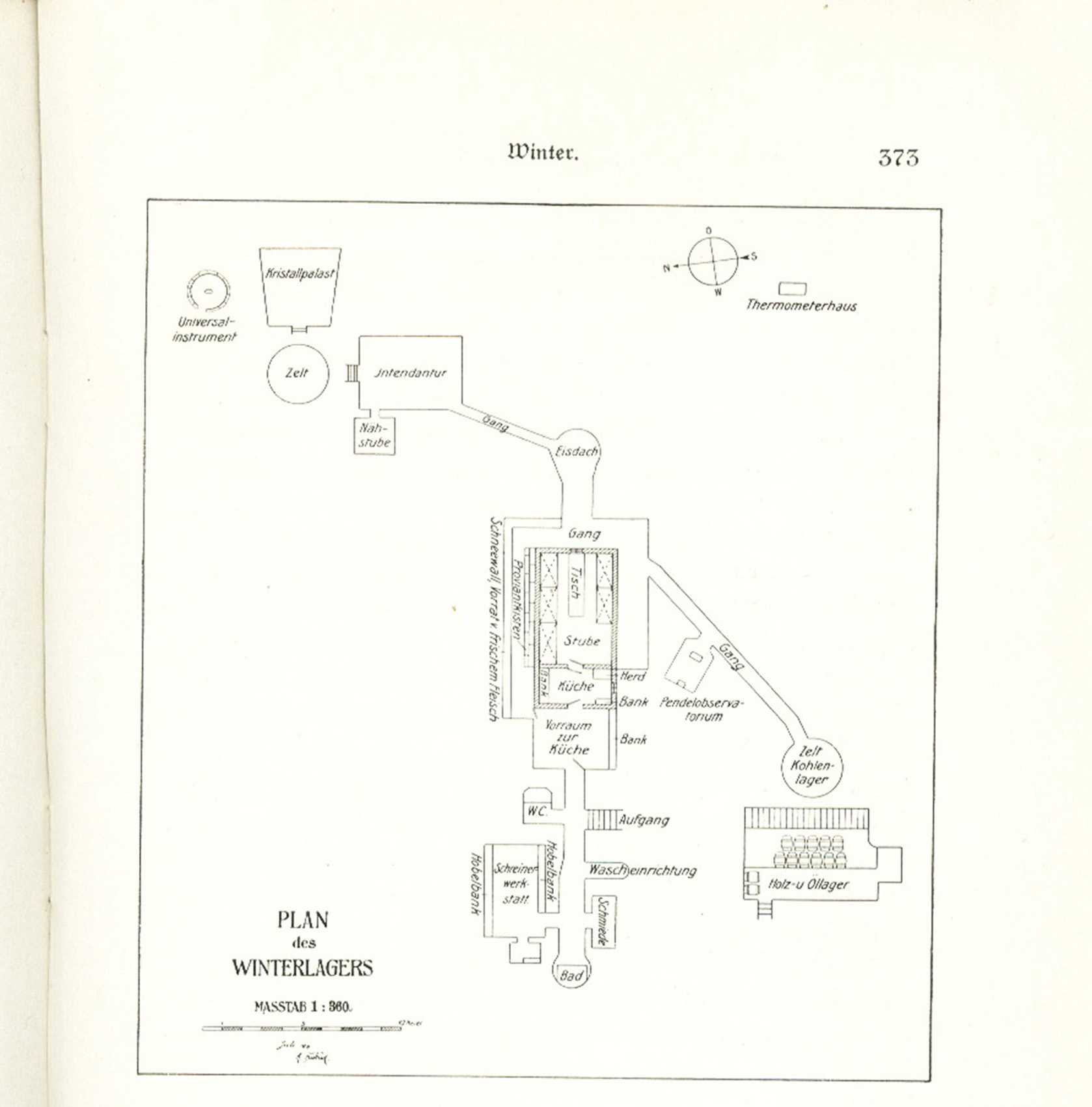 Roald Amundsen. Plan des Winterlagers